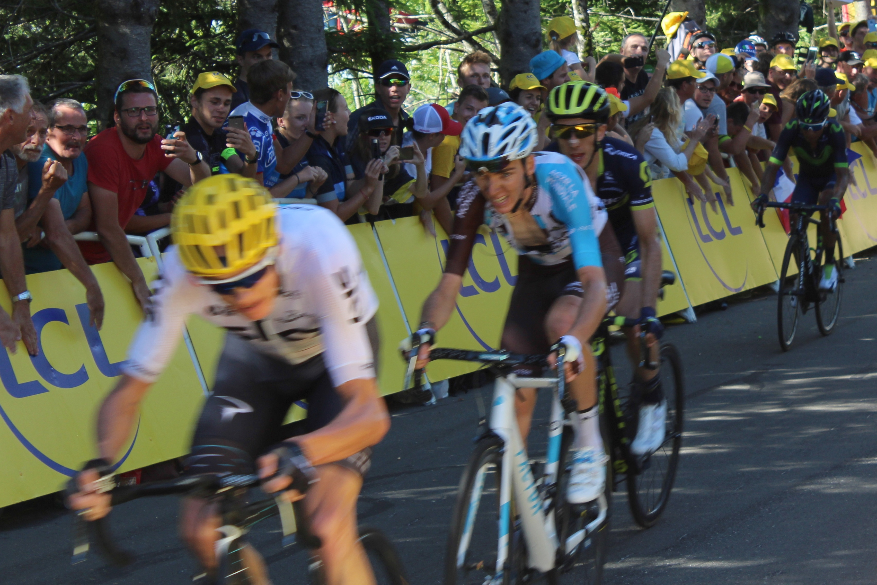 Arrivée de la 5ème étape du Tour de France 2017 à la Planche des Belles Filles.